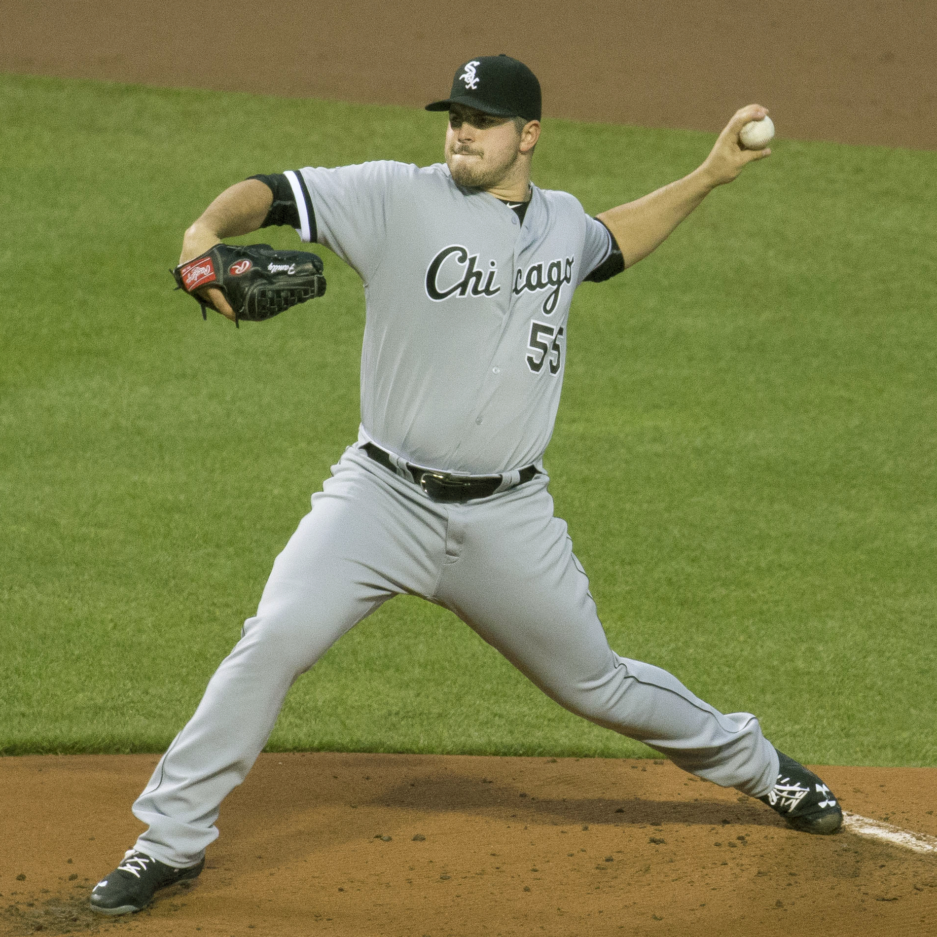 Carlos Rodon